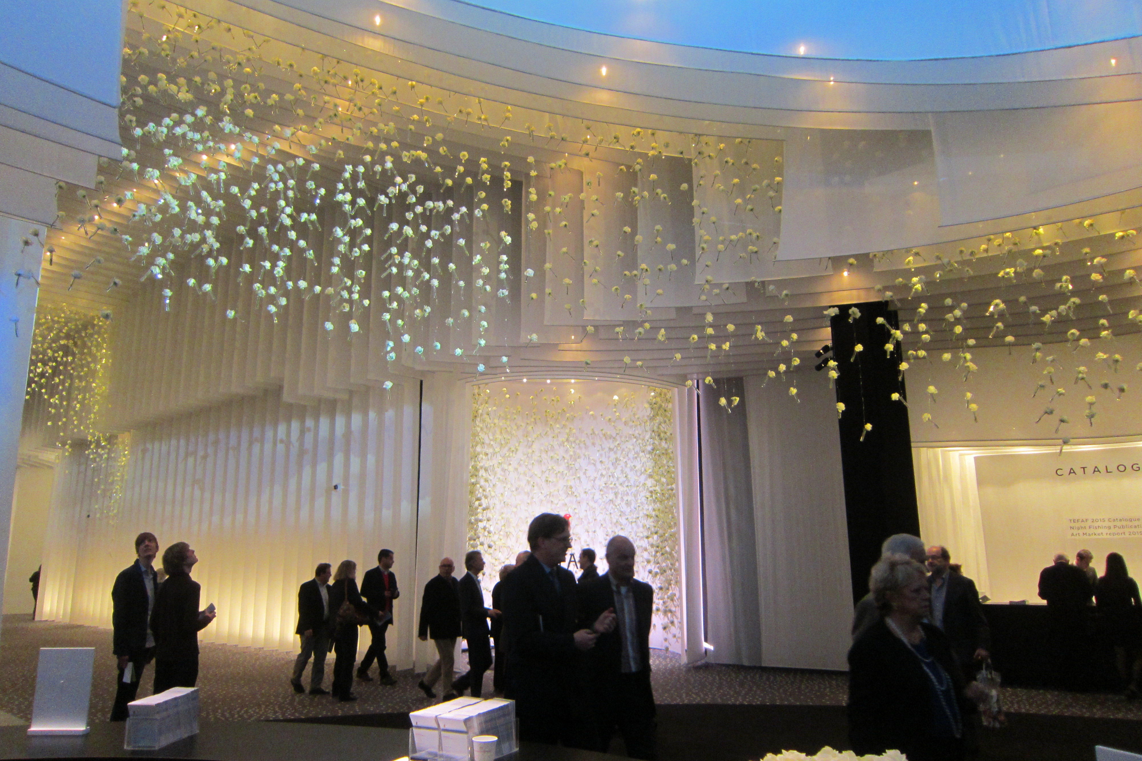 Centrale inkomhal TEFAF 2015, Maastricht